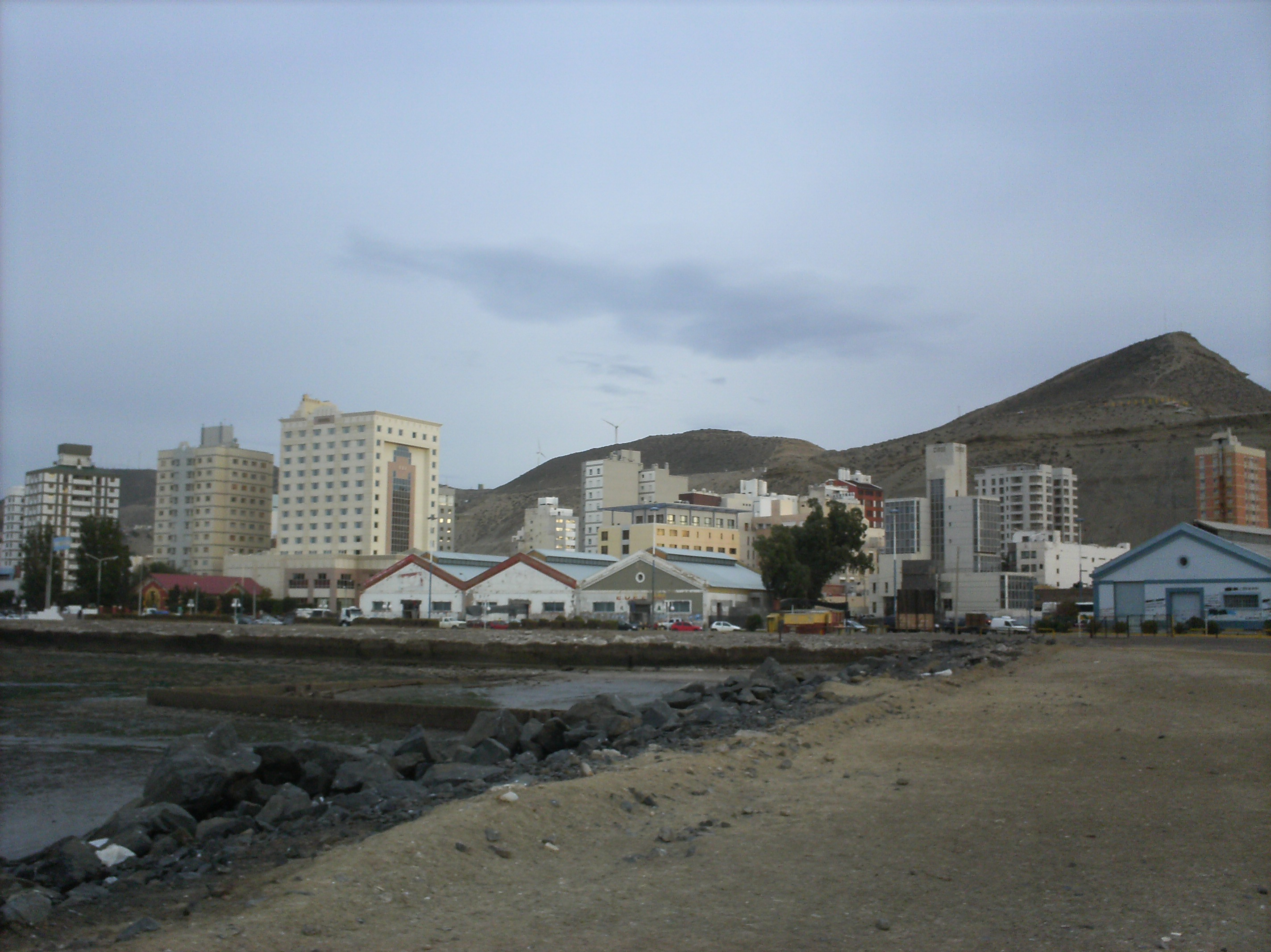 vista parcial panoramica del centro de la ciudad petrolera